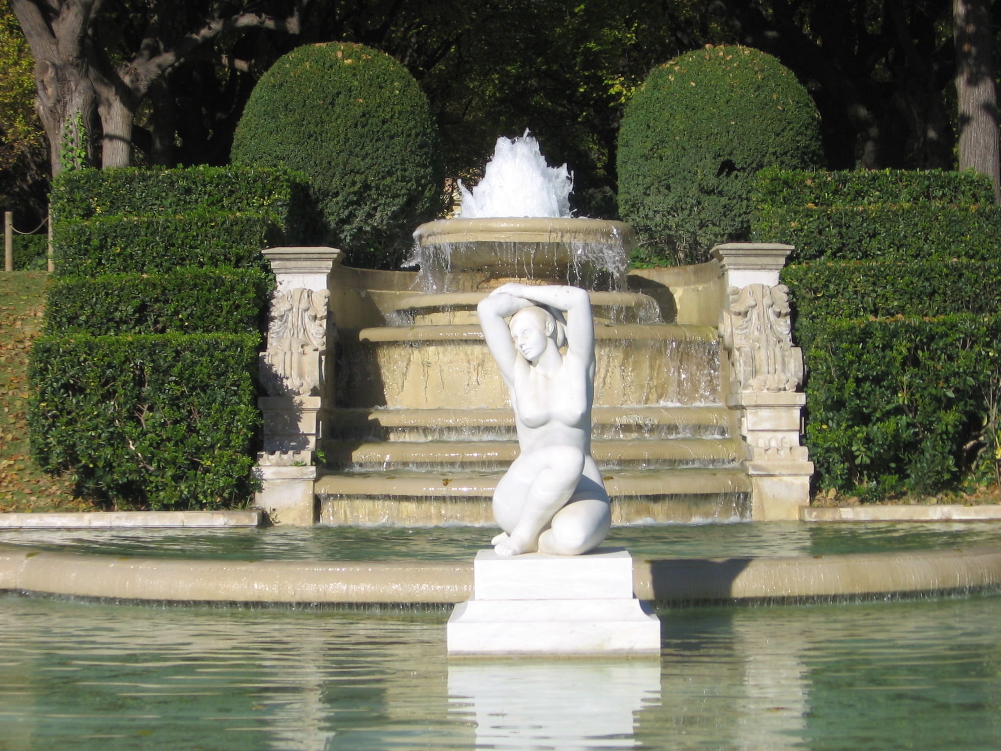 Mediterrània, de Eulàlia Fàbregas de Sentmenat (1962), Jardines de Pedralbes.